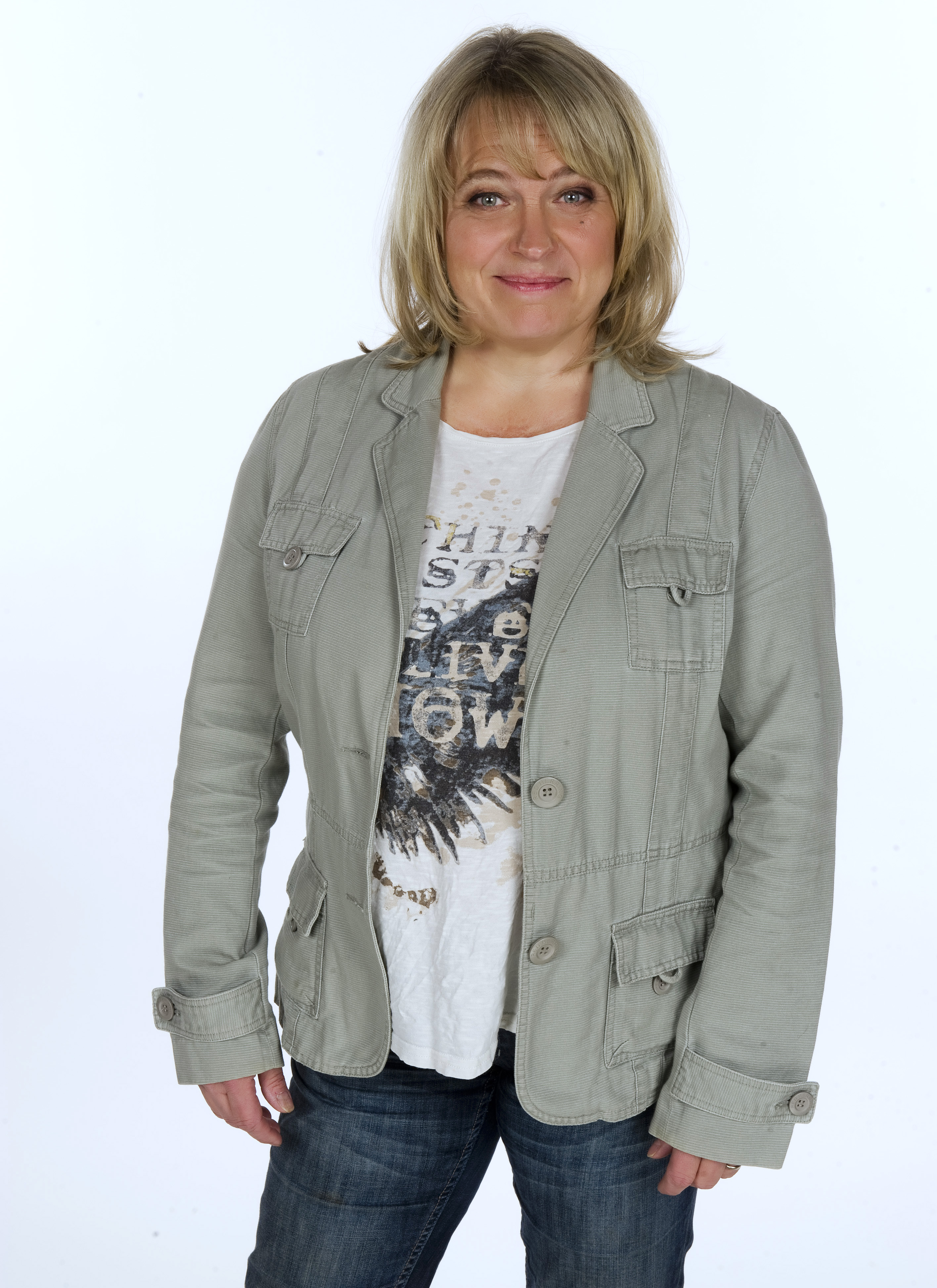 Skådespelerskan Sussie Eriksson.